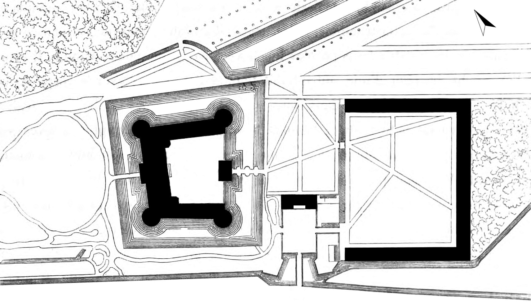 Lageplan des Schlosses Tanlay, Yonne, Burgund